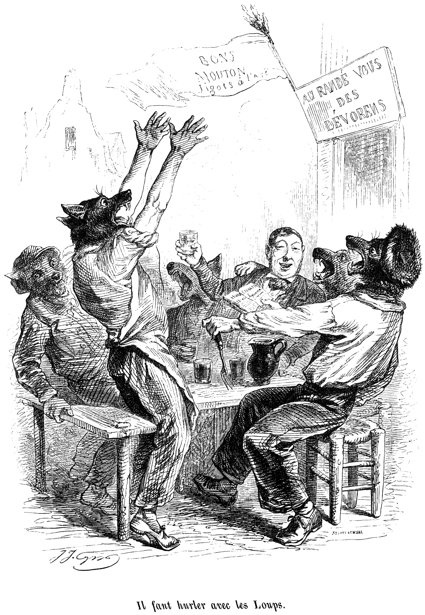 Grandville : Cent Proverbes